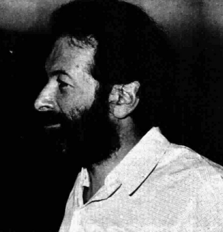 Italian composer Sergio Liberovici